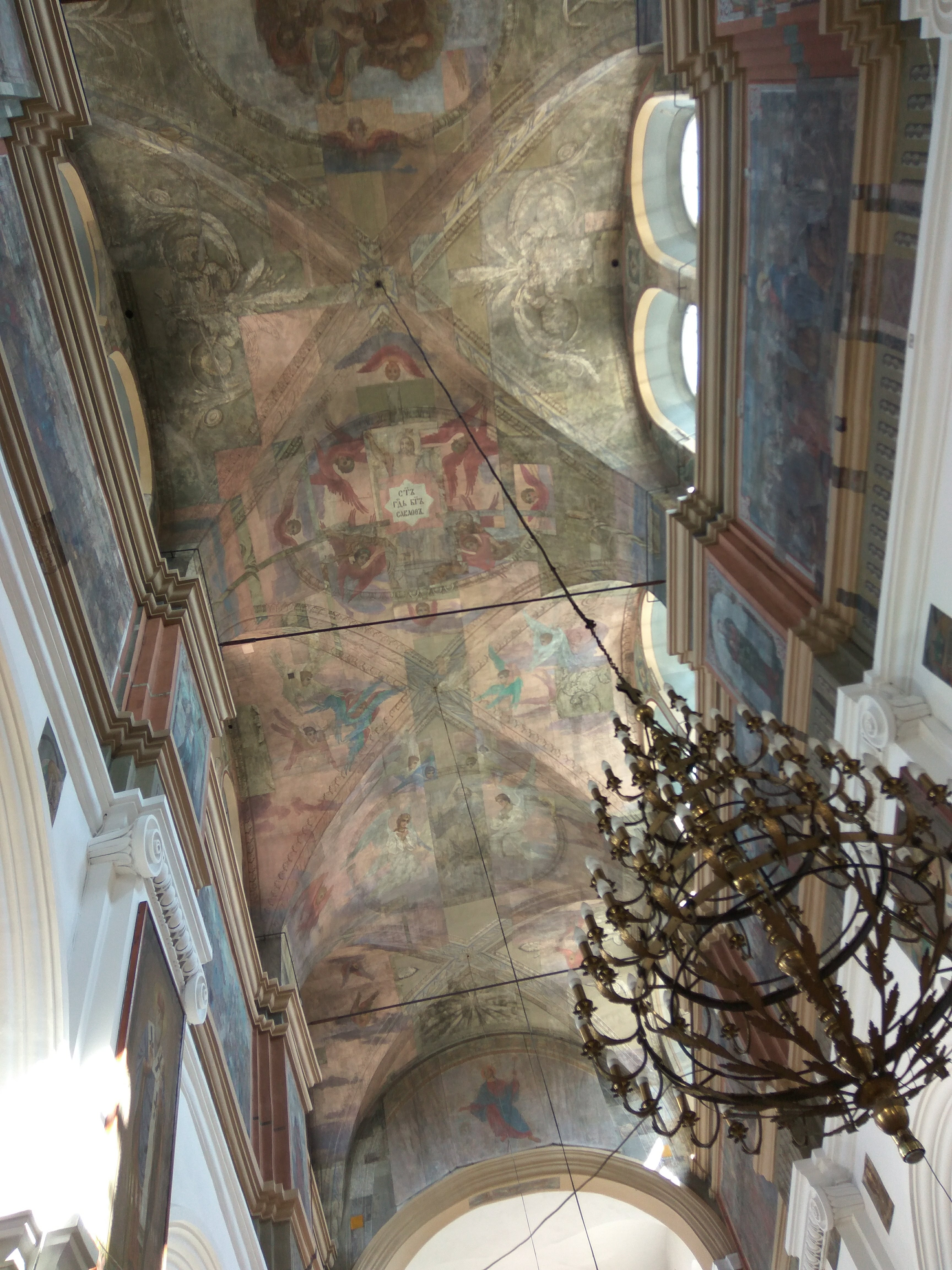 Мінск. Петрапаўлаўская ў жніўні 2018